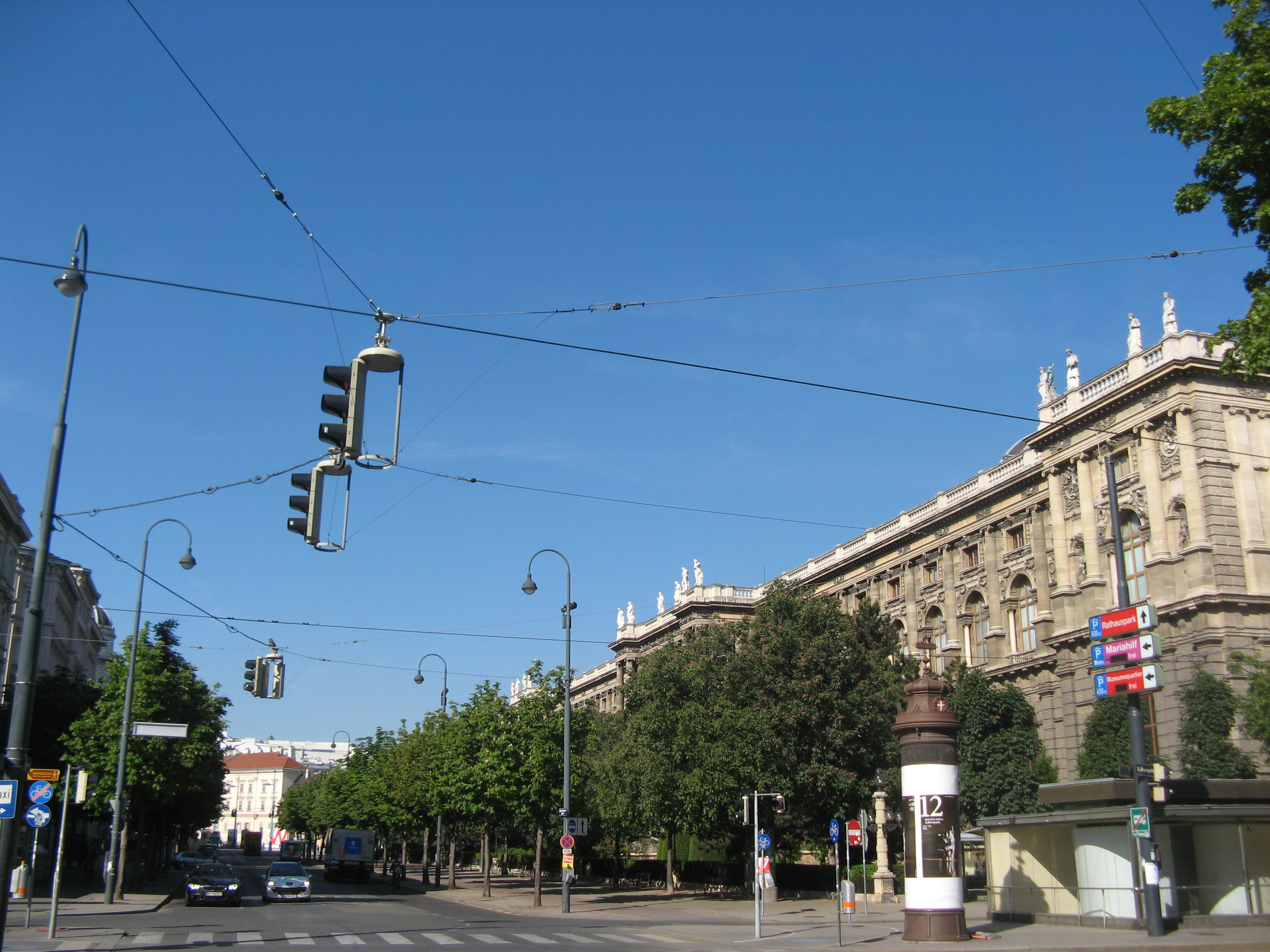 Babenbergerstraße mit Rückseite des Kunsthistorischen Museum, Wien 1